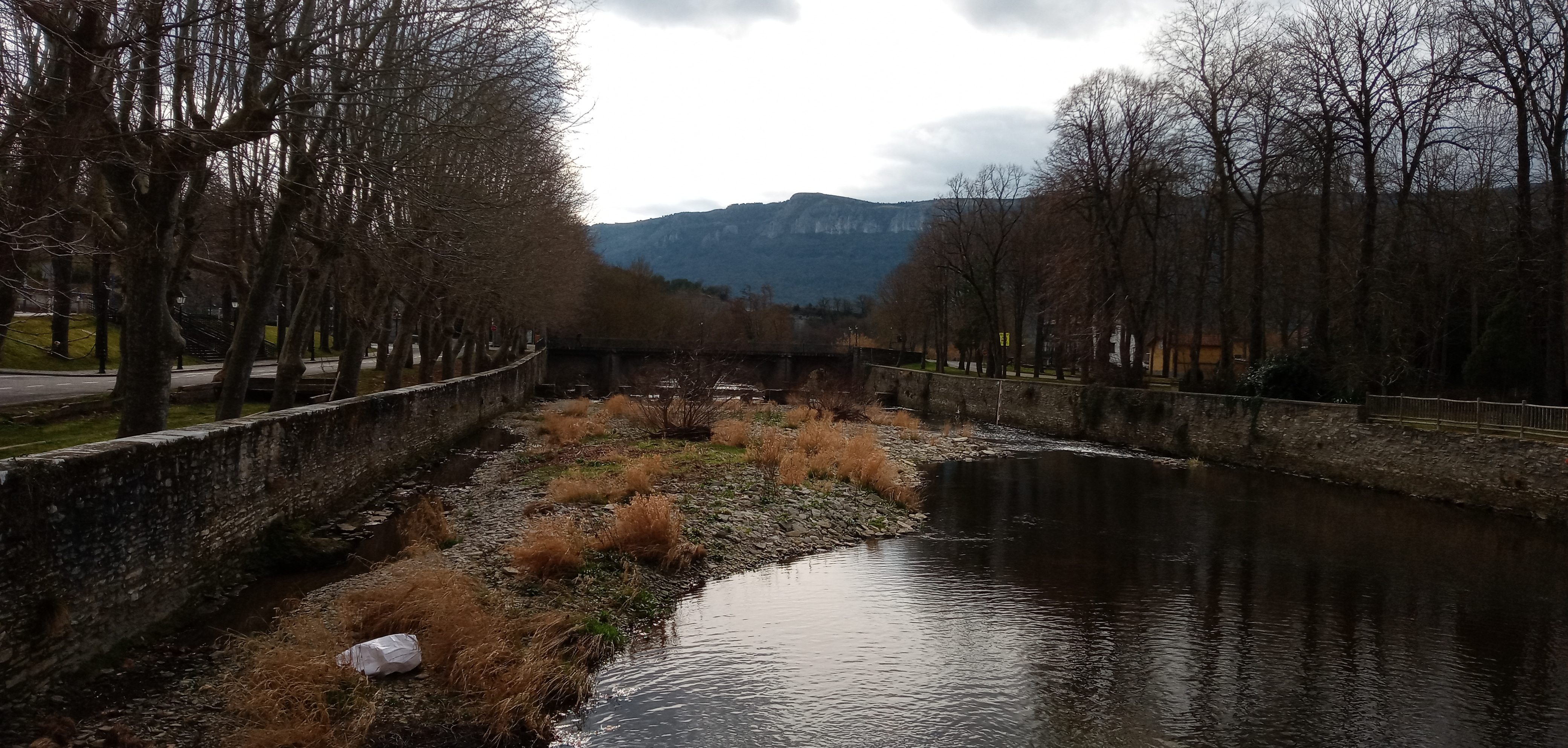 El río Bayas a su paso por Zuazo de Cuartango (Zuhatzu Kuartango), Álava